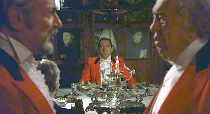 Fotogramma dal film La più bella serata della mia vita di Ettore Scola (1972) Catturato da Pakdooik